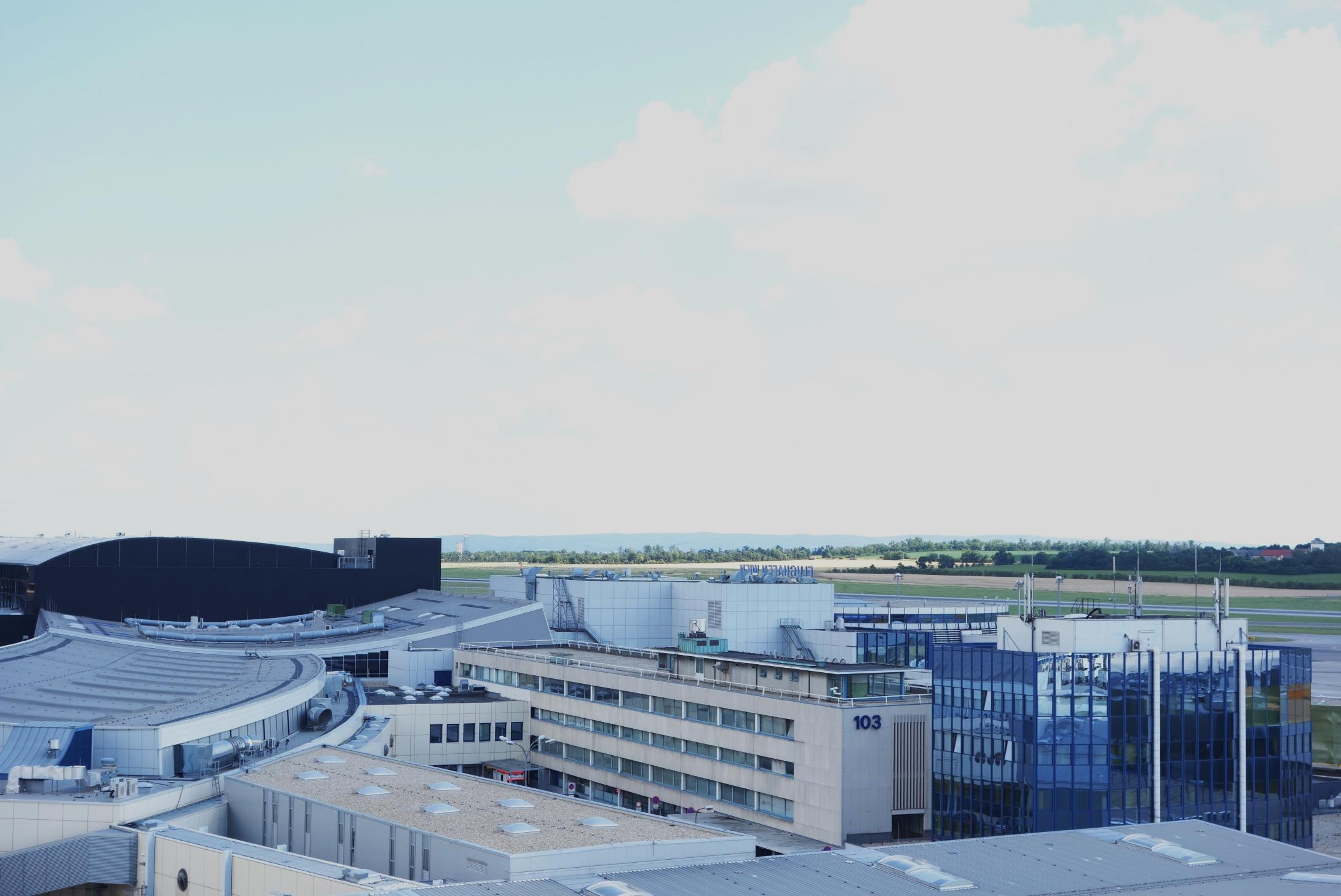 Ausblick vom Parkhaus 3 am Flughafen Wien im Juli 2014. Blickrichtung Osten. Links im Bild die Rückseite von Terminal 1. Dahinter Terminal 2 und Terminal 3. In der Bildmitte ist der westliche Seitentrakt des T2 zu sehen. Dieser wurde mit ihm in den 1960er Jahren errichtet. Ursprünglich existierte ein ähnlicher Seitentrakt auch auf der östlichen Seite, ehe er für T3 abgerissen werden musste. Daneben ist der "Blaue Turm" zu erkennen; ein umgebauter ehemaliger Aussichtsturm ebenfalls aus der Bauzeit des T2. Richtung Vorfeld schließen südlich an den T2 die Piers Ost und West an. Die früher freiliegende Südfassade wurde dadurch verbaut.